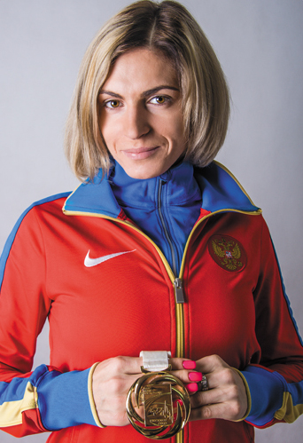 Антонина Кривошапка. Российская бегунья, заслуженный мастер спорта, серебряный призер Олимпиады, чемпионка мира в эстафете 4х400 м, четырехкратный бронзовый призер чемпионатов мира, трехкратная чемпионка Европы. Фотография из серии «Лица эстафеты».